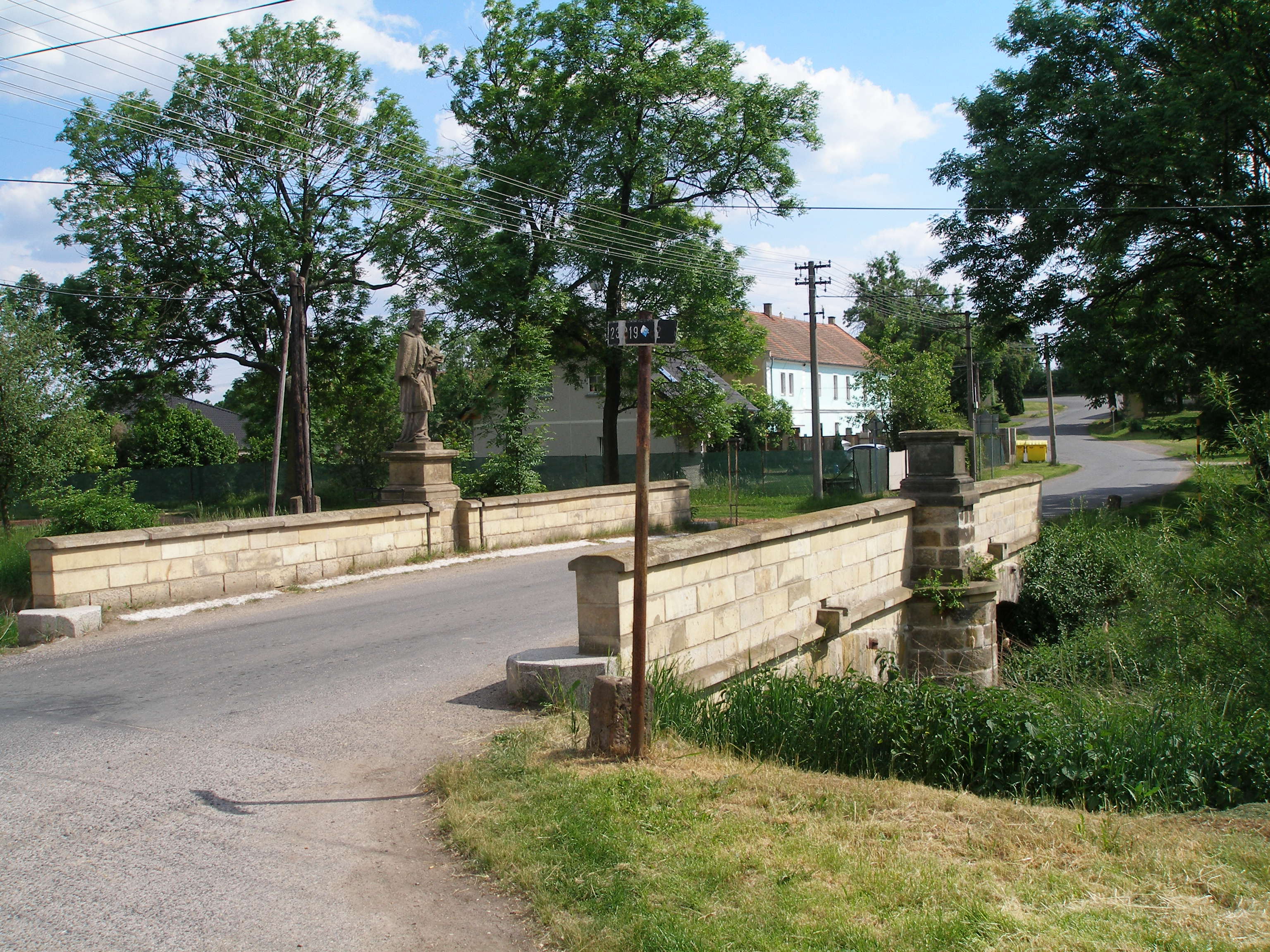 Silniční most v Tmáni.